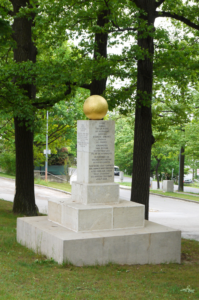 Ereignisdenkmal, Friedensdenkmal der Siedlung Friedensstadt